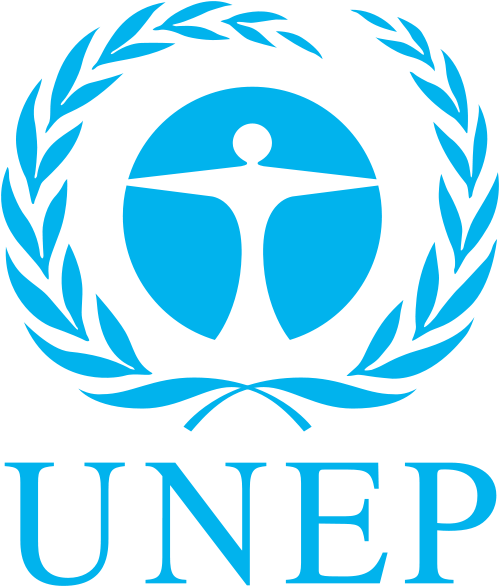 PNUMA logo